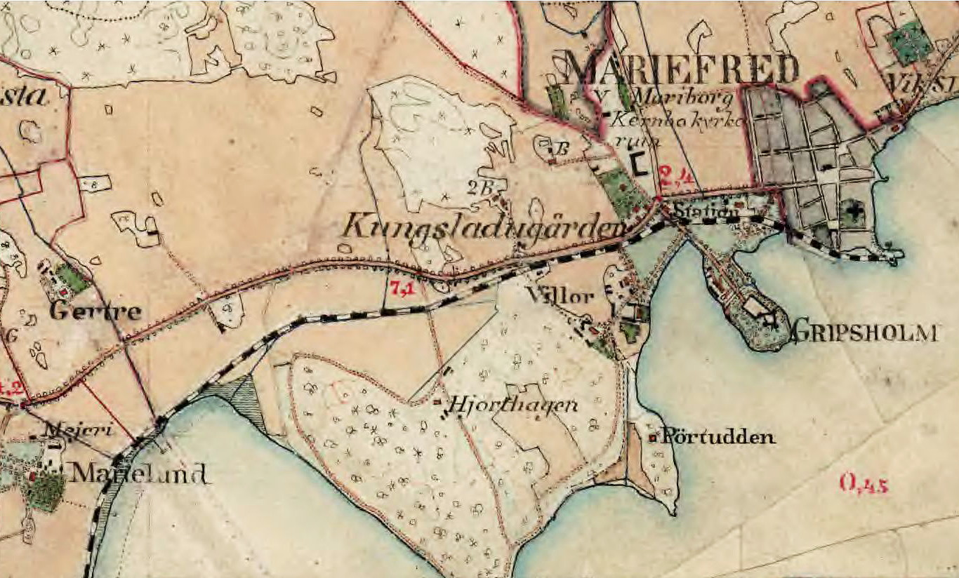 Orten Mariefred och järnvägsstationen Mariefred